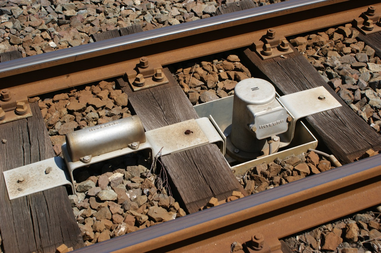 Station Intragna der FART. Detailaufnahme der Integra-Magnete der Zugsicherung ZST-90: von rechts nach links (Fahrtrichtung) Elektromagnet Nordpol, Liegender Permanentmagnet Süd-Nord